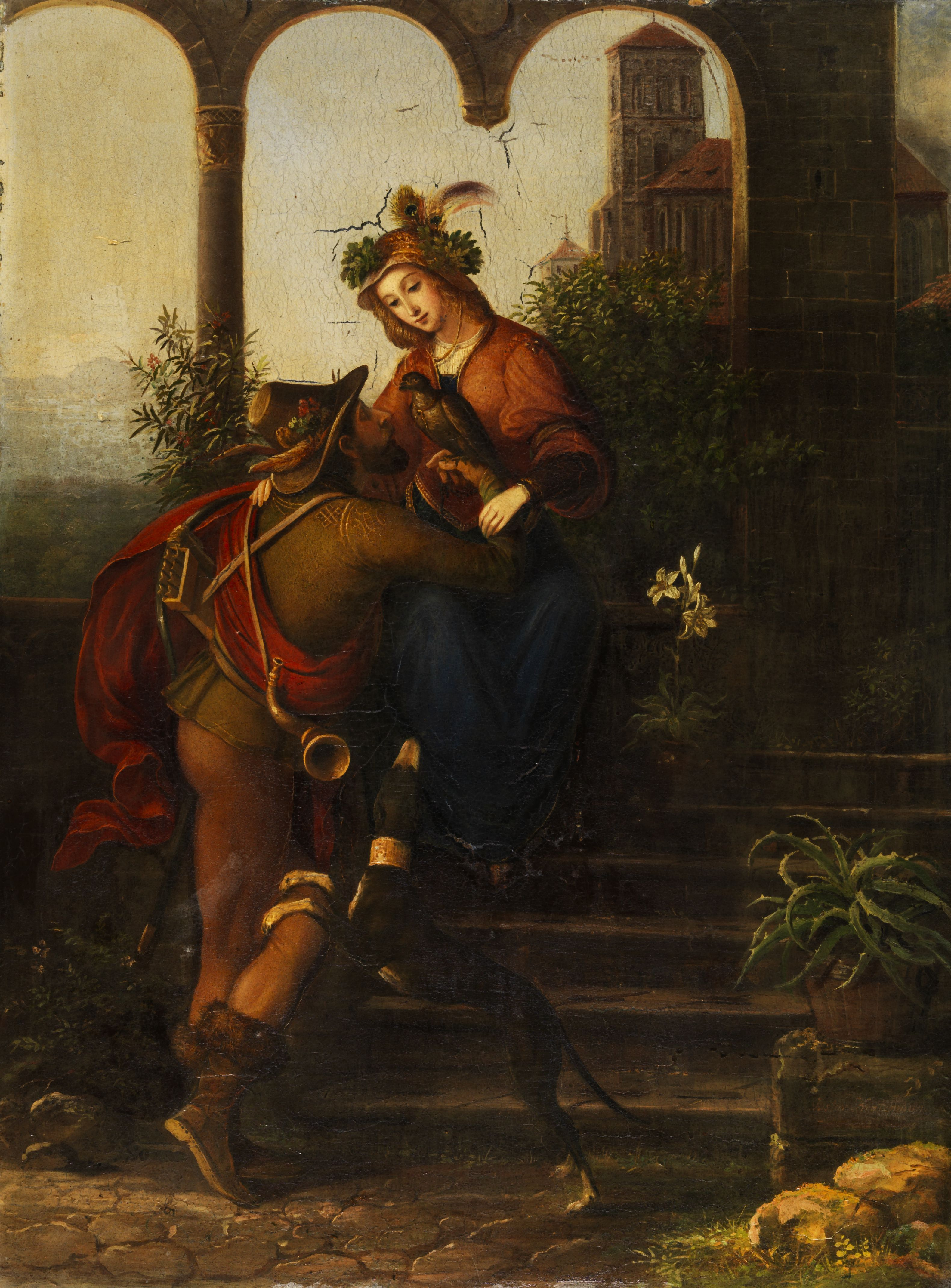 Der Abschied des Falkners (eventuell Illustration zu einem literarischen Werk). Öl auf Holz. 69,5 x 51,5 cm.